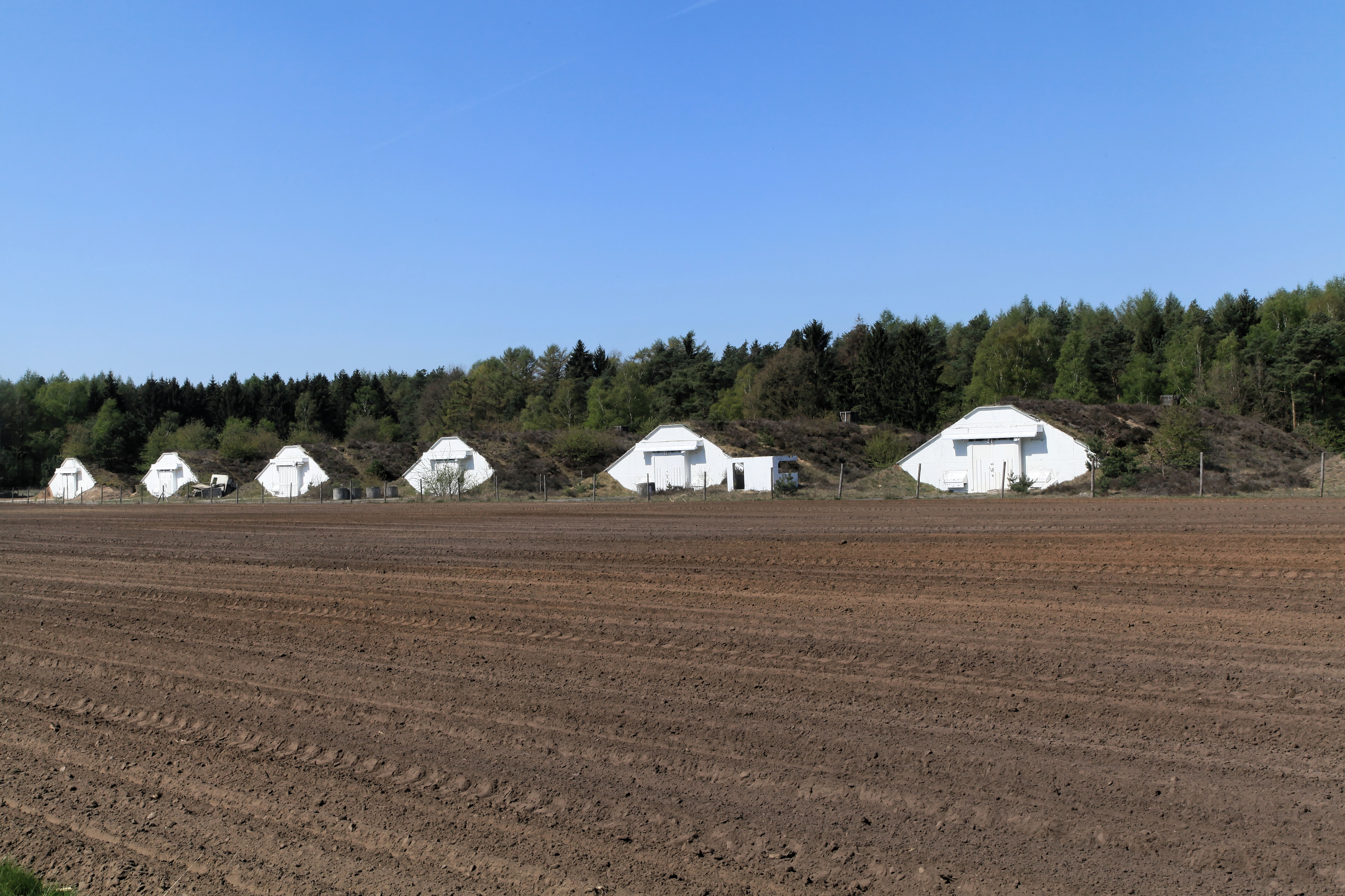 Sondermunitionslager Lahn (ehemals Lagerort von Nuklearwaffen), Werlter Straße in Lahn (Hümmling)